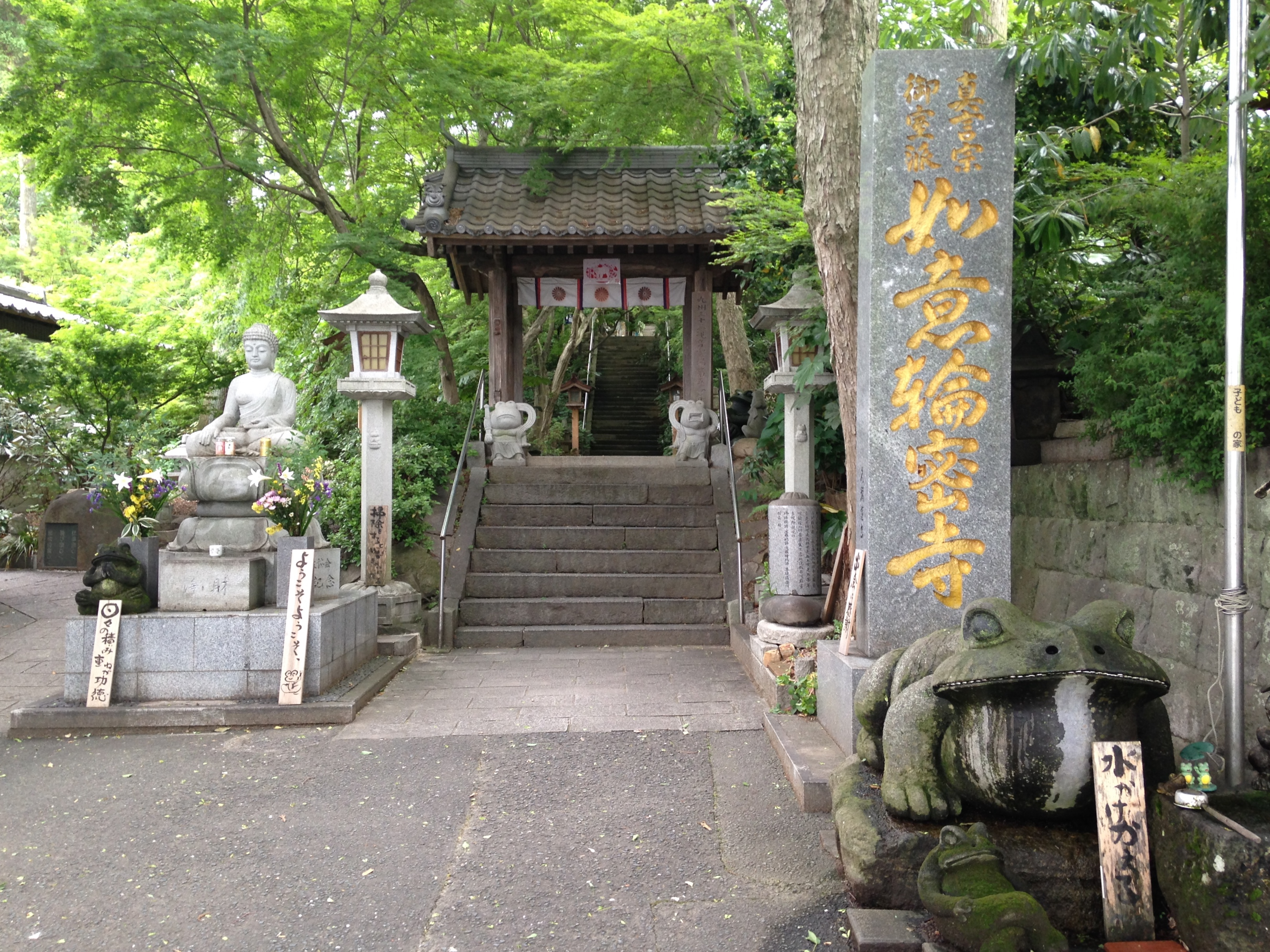 如意輪寺の山門